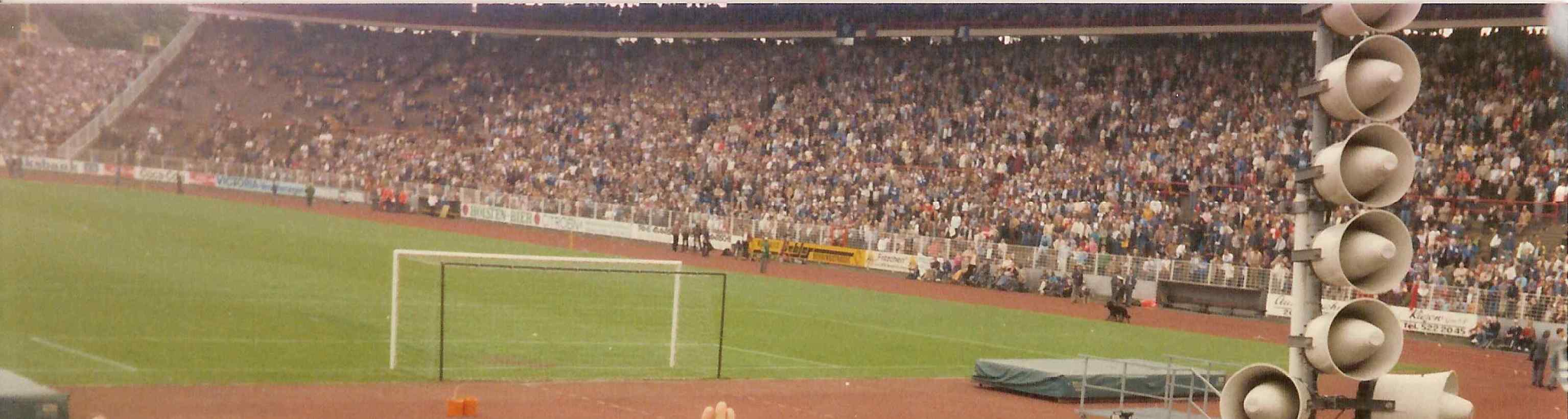 Das Hamburger Volksparkstadion (Südtribune). Heisst seit 2001 AOL Arena.